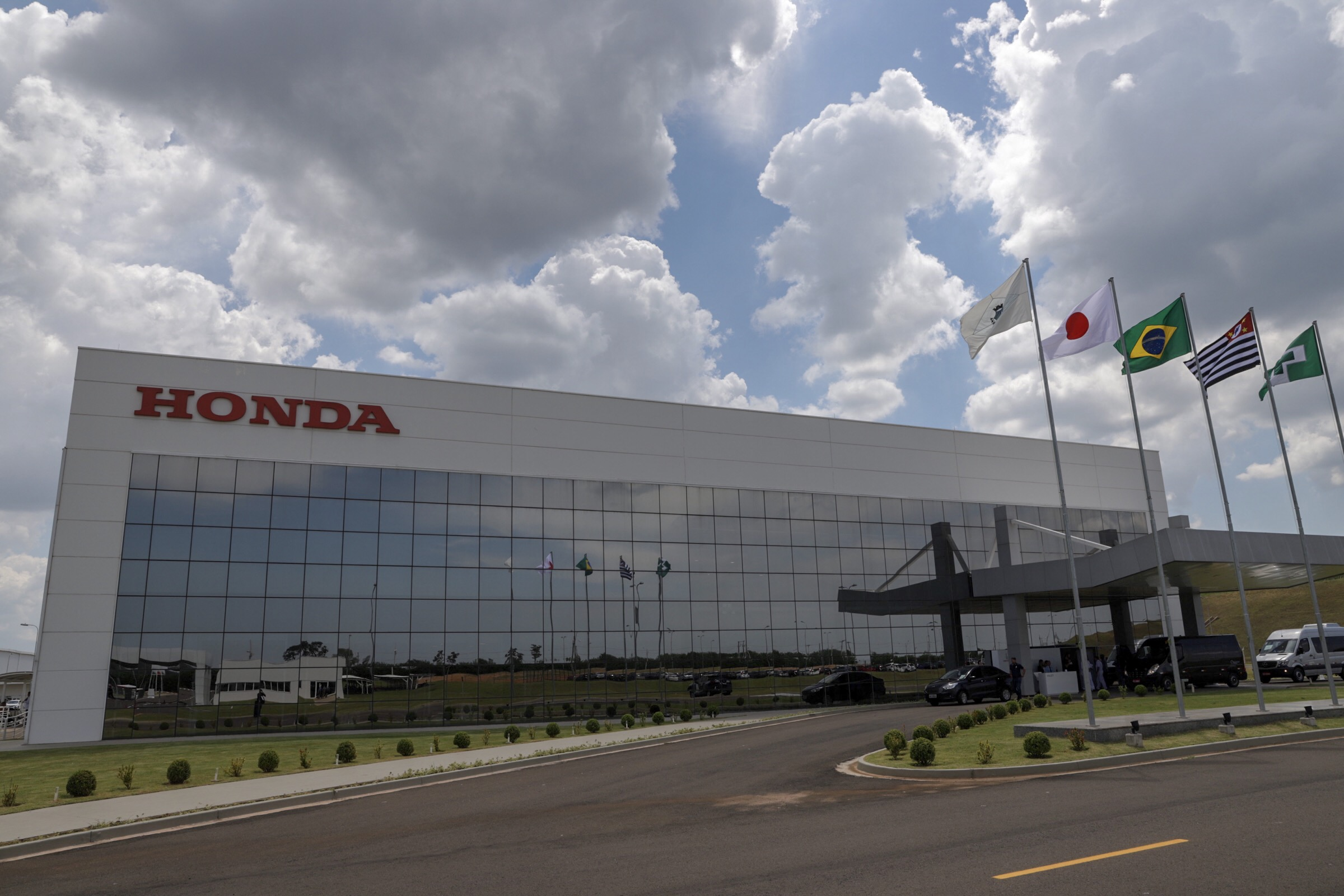 O governador do estado de São Paulo, João Doria, participa da cerimônia de celebração de ativação das operações da nova fábrica de automóveis da Honda. Local: Itirapina /SP. Data: 27/03/2019 Foto: Governo do Estado de São Paulo